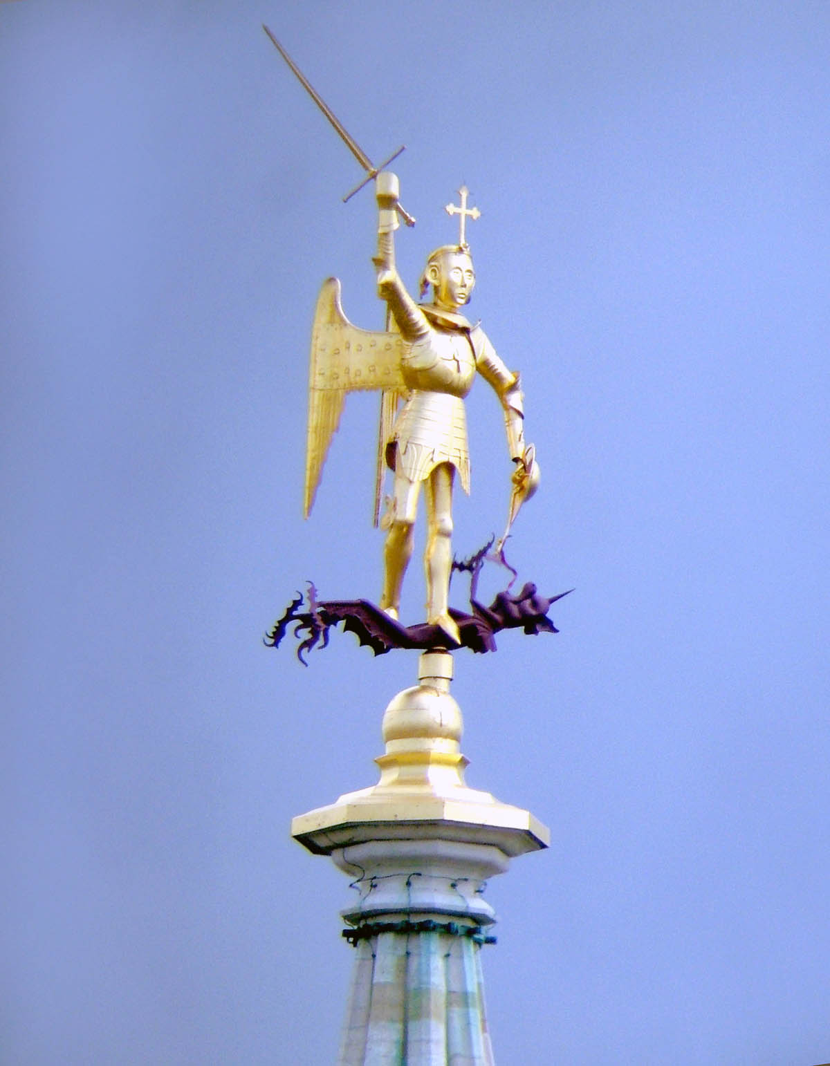 Girouette de l'hôtel de ville de Bruxelles restaurée